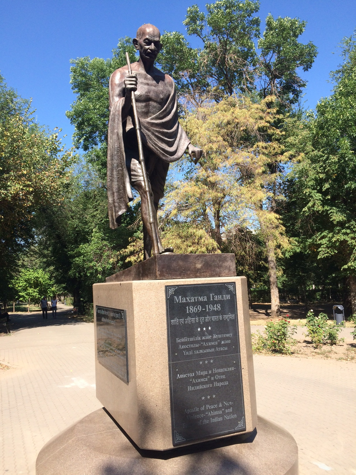 Статуя Ганди в Алматы